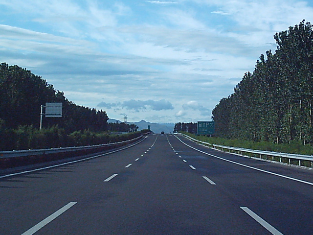 京承高速公路，CNDF08在2004年拍照的图片